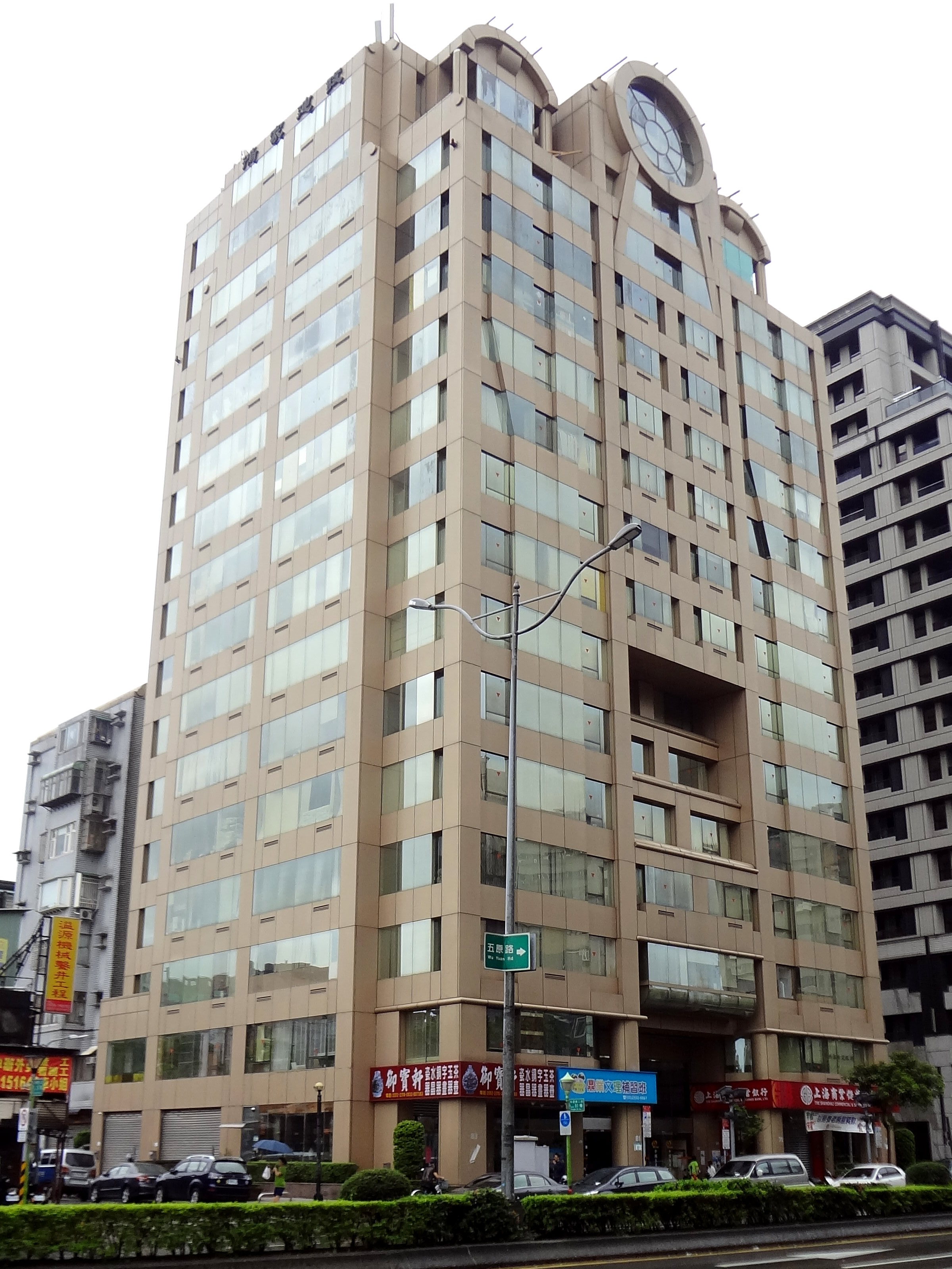 首府經貿大廈，位於臺北市大同區承德路二段，東立出版社總部設於81號10樓。